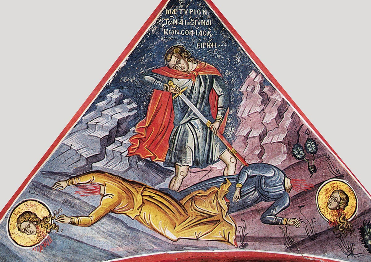 Мучение свв. Софии и Ирины. Тзортзи (Зорзис) Фука. Фреска. Афон (Дионисиат). 1547 г.